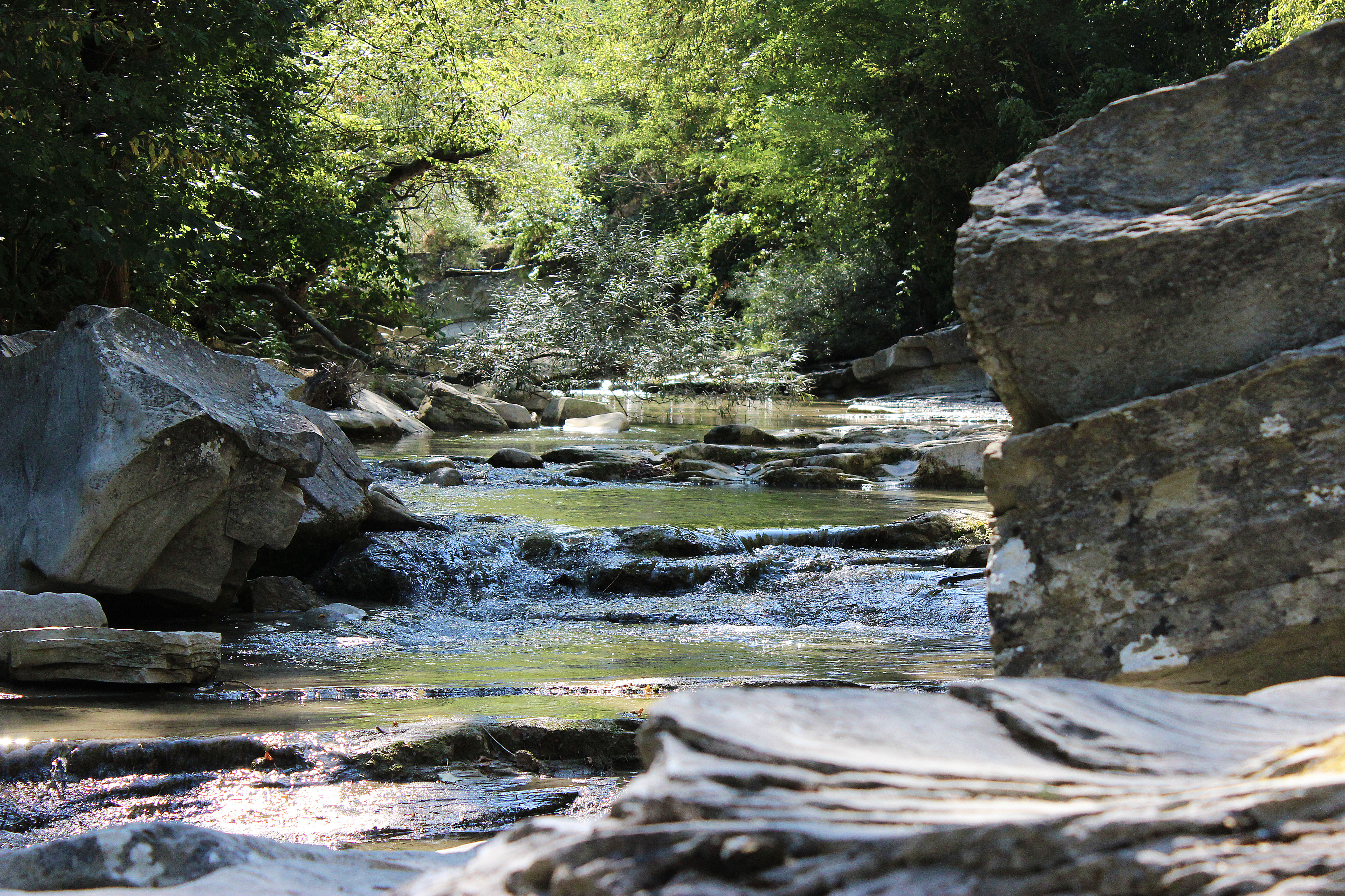 Fiume Rabbi This is a photo of a monument which is part of cultural heritage of Italy.